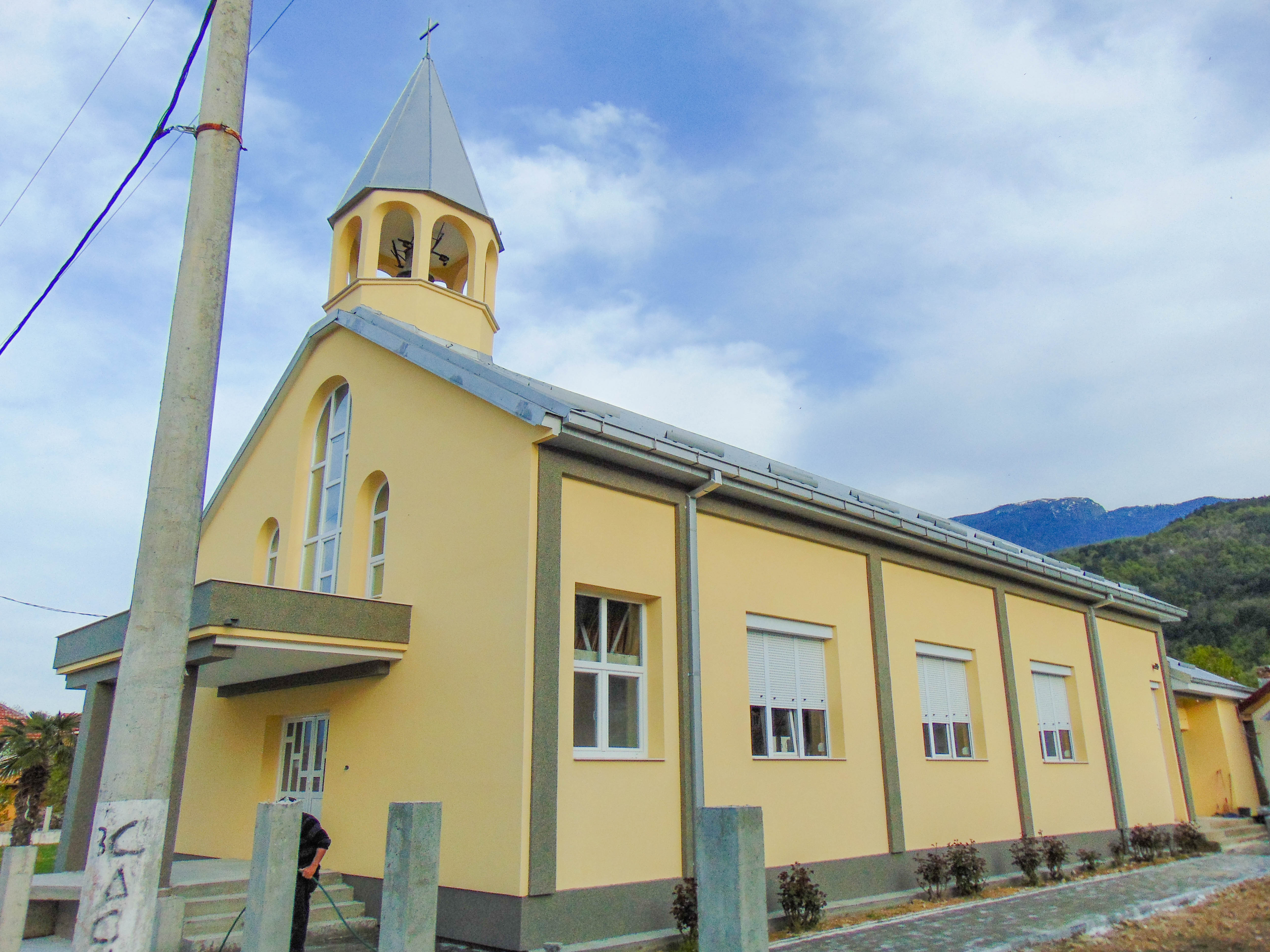 Евангелско-методистичка црква